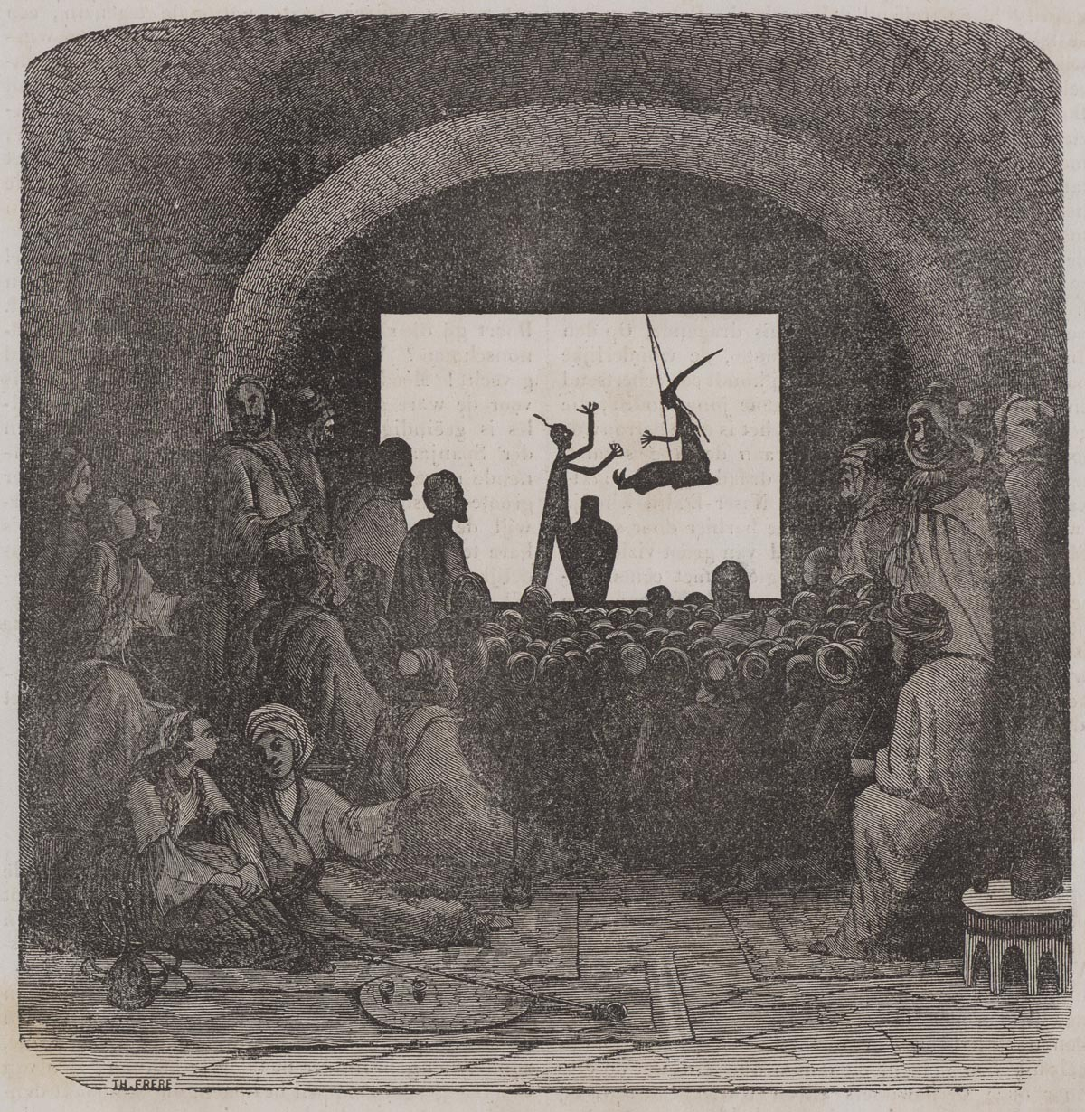 Gravure Spectacle d'ombres chinoises à Alger